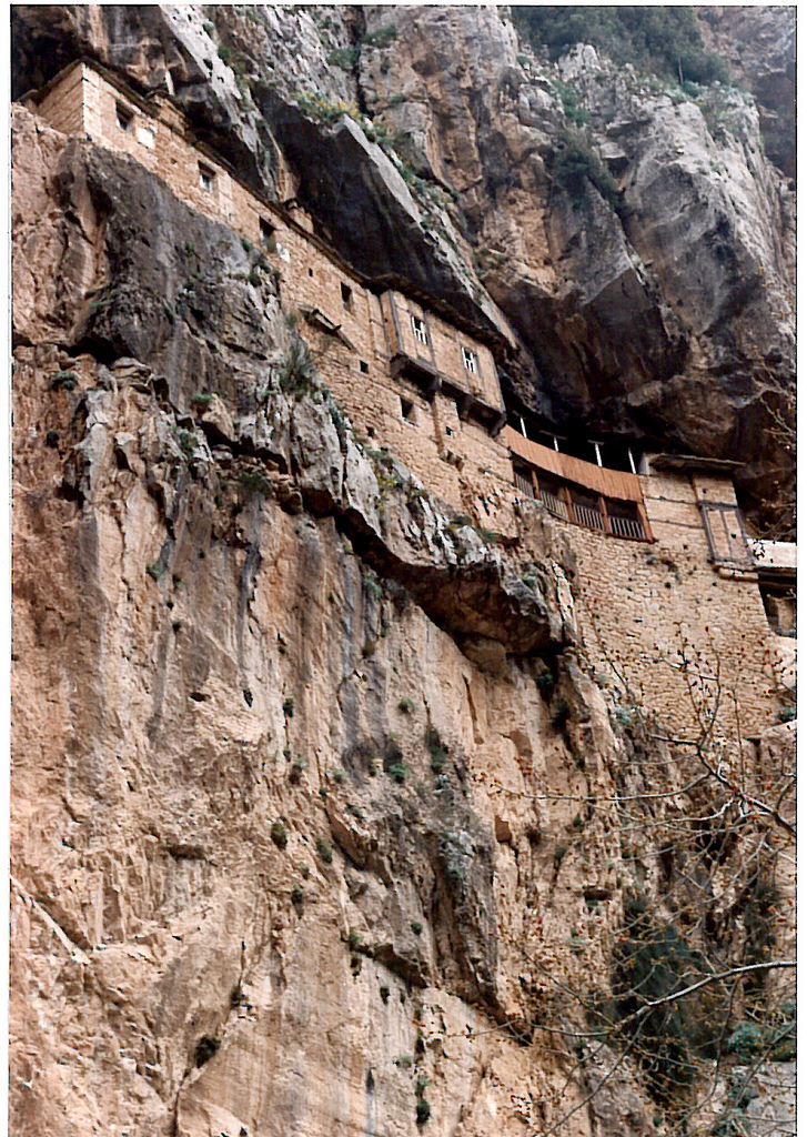 Χτισμένη σε γκρεμό στην είσοδο μεγάλης ανεξερεύνητης σπηλιάς, στο δρόμο για Καλαρύτες από τα Πράμαντα